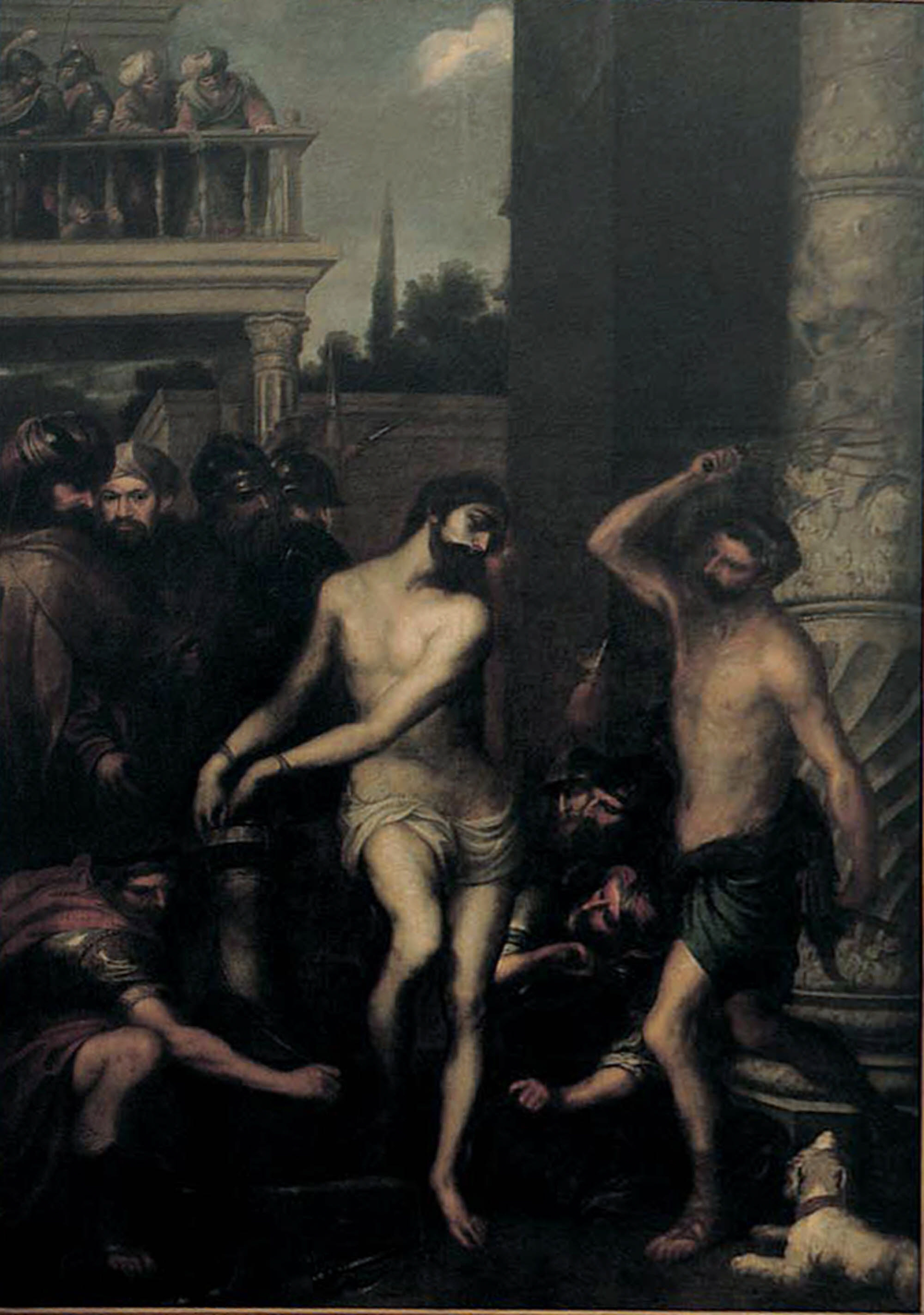 La obra representa a Jesucristo siendo azotado.